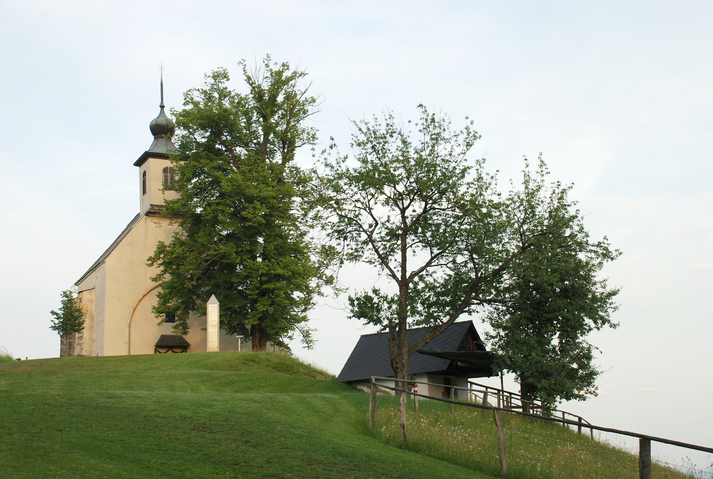 Hollenegg, Steiermark, Österreich: St. Wolfgang Kirche